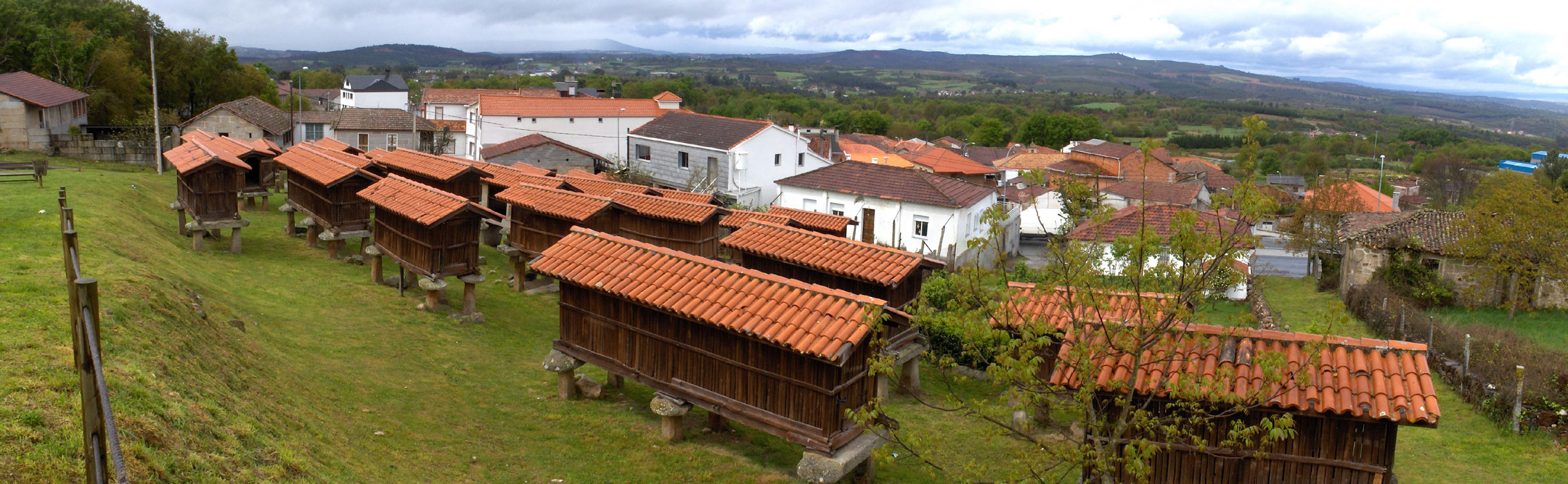 A Merca, Ourense